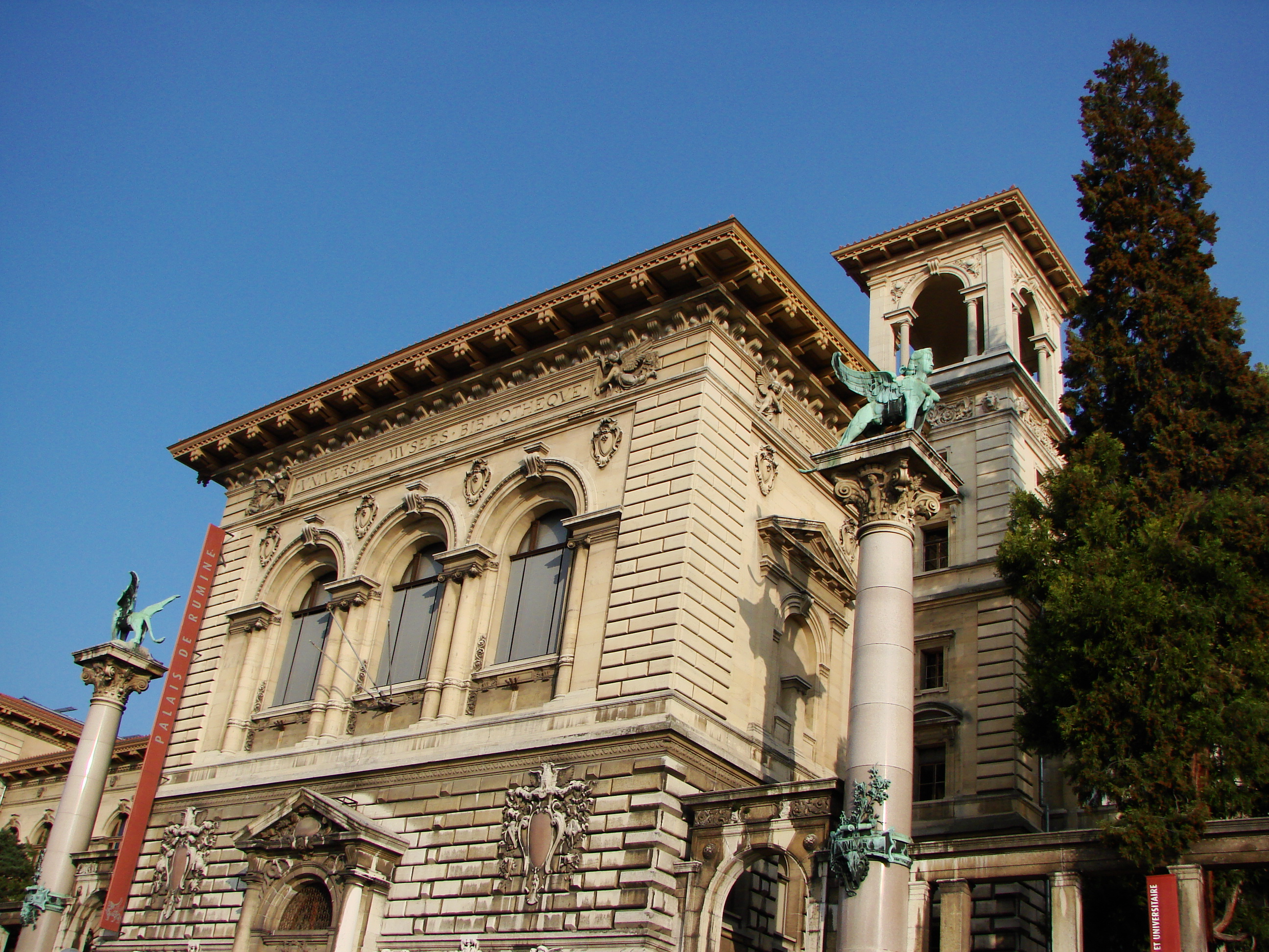 Palais de Rumine, ville de Lausanne (Suisse) : façade de l'entrée principale sur la place de Riponne.